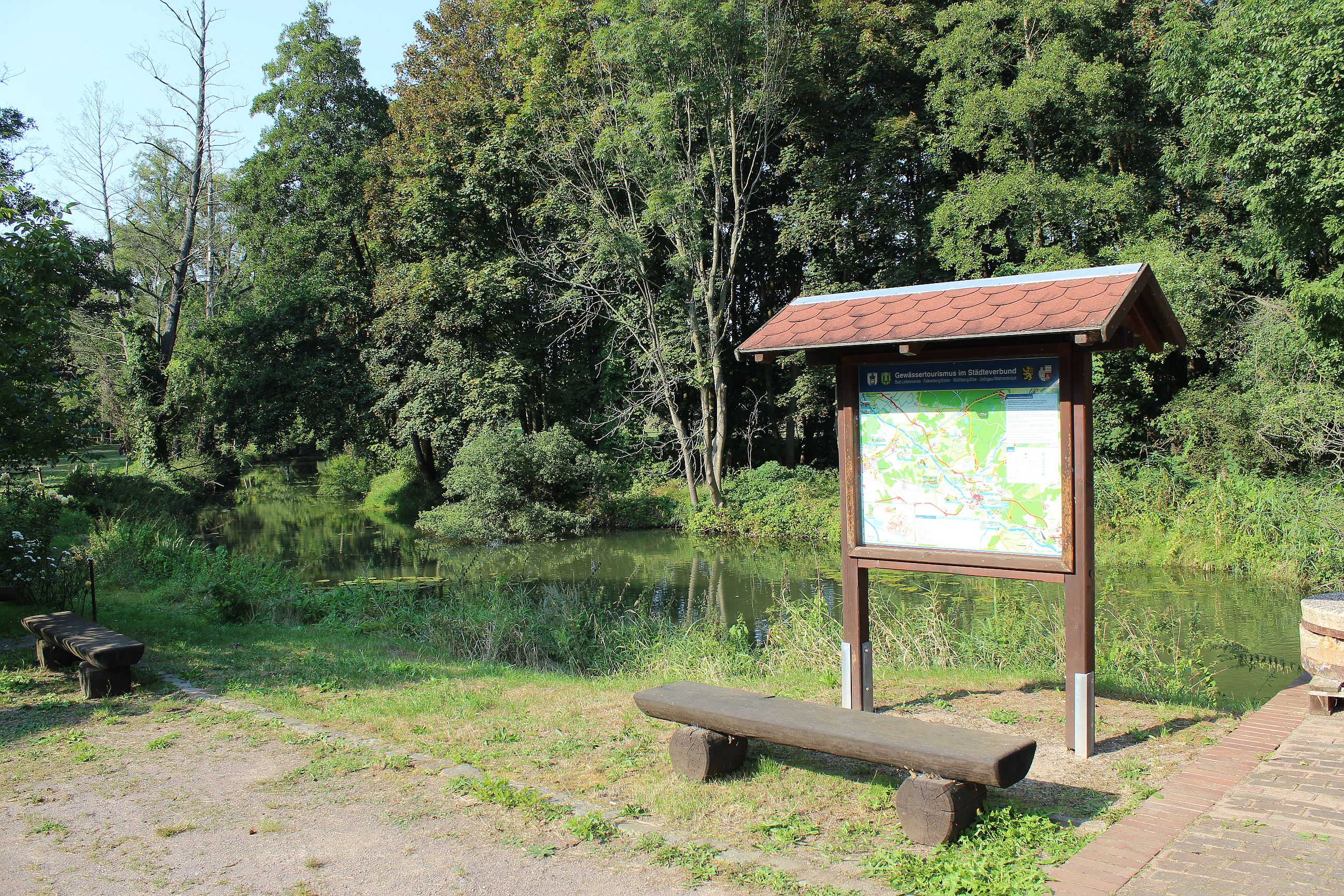 Infotafel am Hochpolgenerator Neumühl